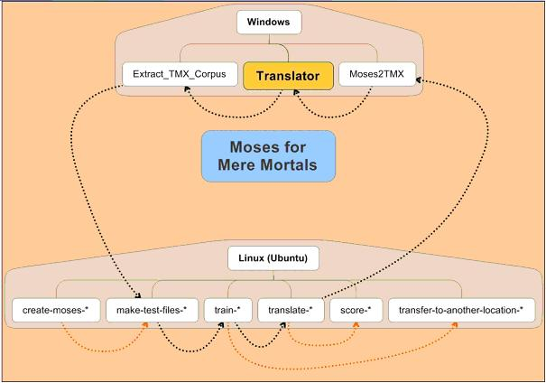 Esquema dos diferentes componentes do MMM - Moses for Mere Mortals